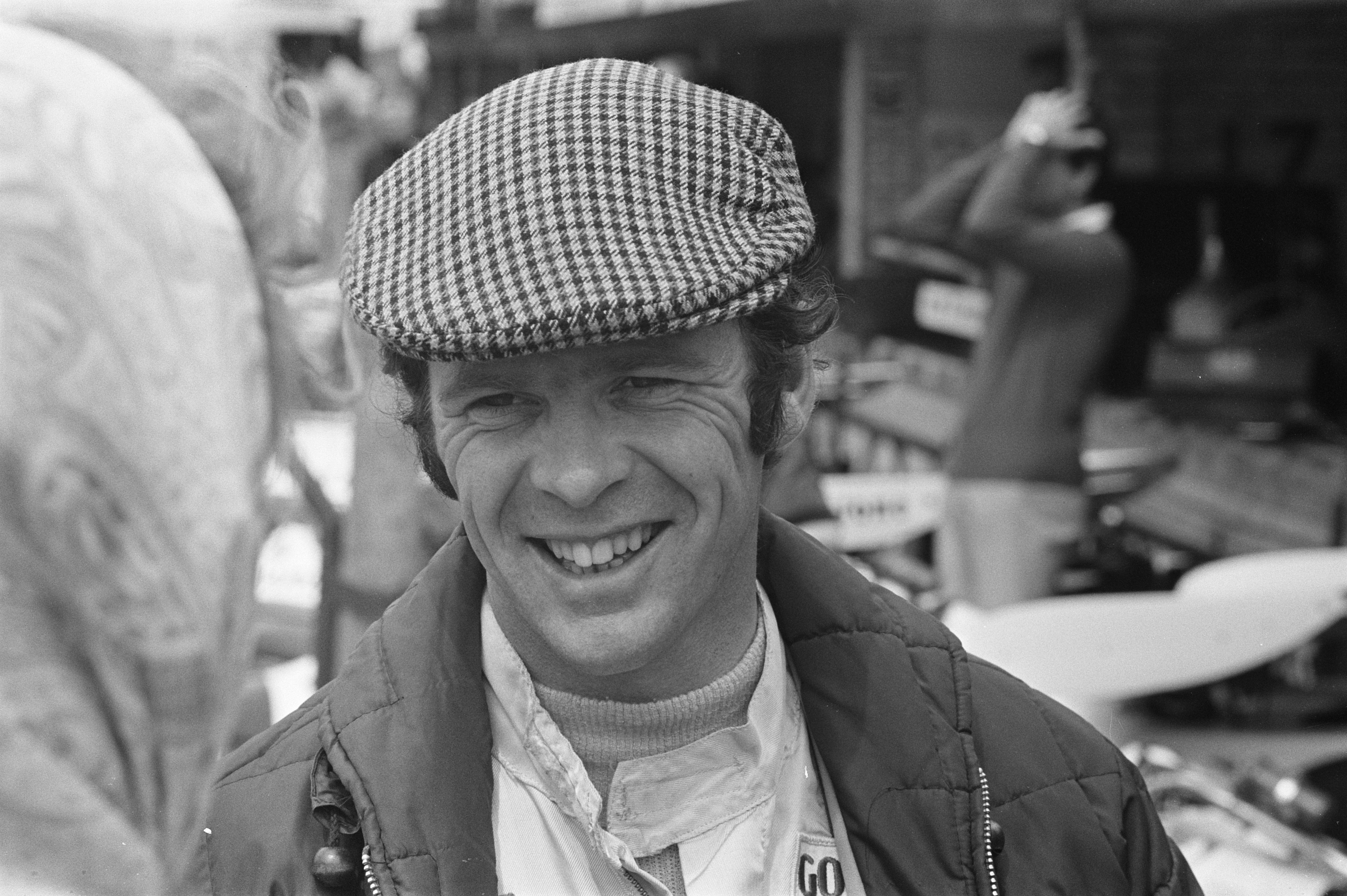 Collectie / Archief : Fotocollectie Anefo Reportage / Serie : Training voor de Grand Prix van 1971 op Zandvoort voor formule 1-wagens Beschrijving : Peter Gethin Annotatie : Randnummers negatiefstrook: 9: Peter Gethin; 10: Henri Pescarolo; 11: Jo Siffert Datum : 18 juni 1971 Locatie : Noord-Holland, Zandvoort Trefwoorden : autosport, circuits, hoofddeksels, portretten, raceauto's, races, wedstrijden Persoonsnaam : Gethin, Peter Fotograaf : Fotograaf Onbekend / Anefo, [onbekend] Auteursrechthebbende : Nationaal Archief Materiaalsoort : Negatief (zwart/wit) Nummer archiefinventaris : bekijk toegang 2.24.01.05 Bestanddeelnummer : 924-6614 Reacties Geplaatst door Rob Wiedenhoff op 09 november 2008 - 11:34. LS, De foto toont inderdaad de Engelse coureur Peter Gethin, maar bij de nummers (startnummers of nummers van de negatiefstrook?) ontstaat verwarring. Destijds was nummer 9 voor Jo Siffert, nummer 10 voor Howden Ganley en werd nummer 11 niet toegekend. Henri Pescarolo (niet Pescarola) startte onder nummer 31 en Peter Gethin met nummer 28. Met vriendelijke groet, Rob Wiedenhoff